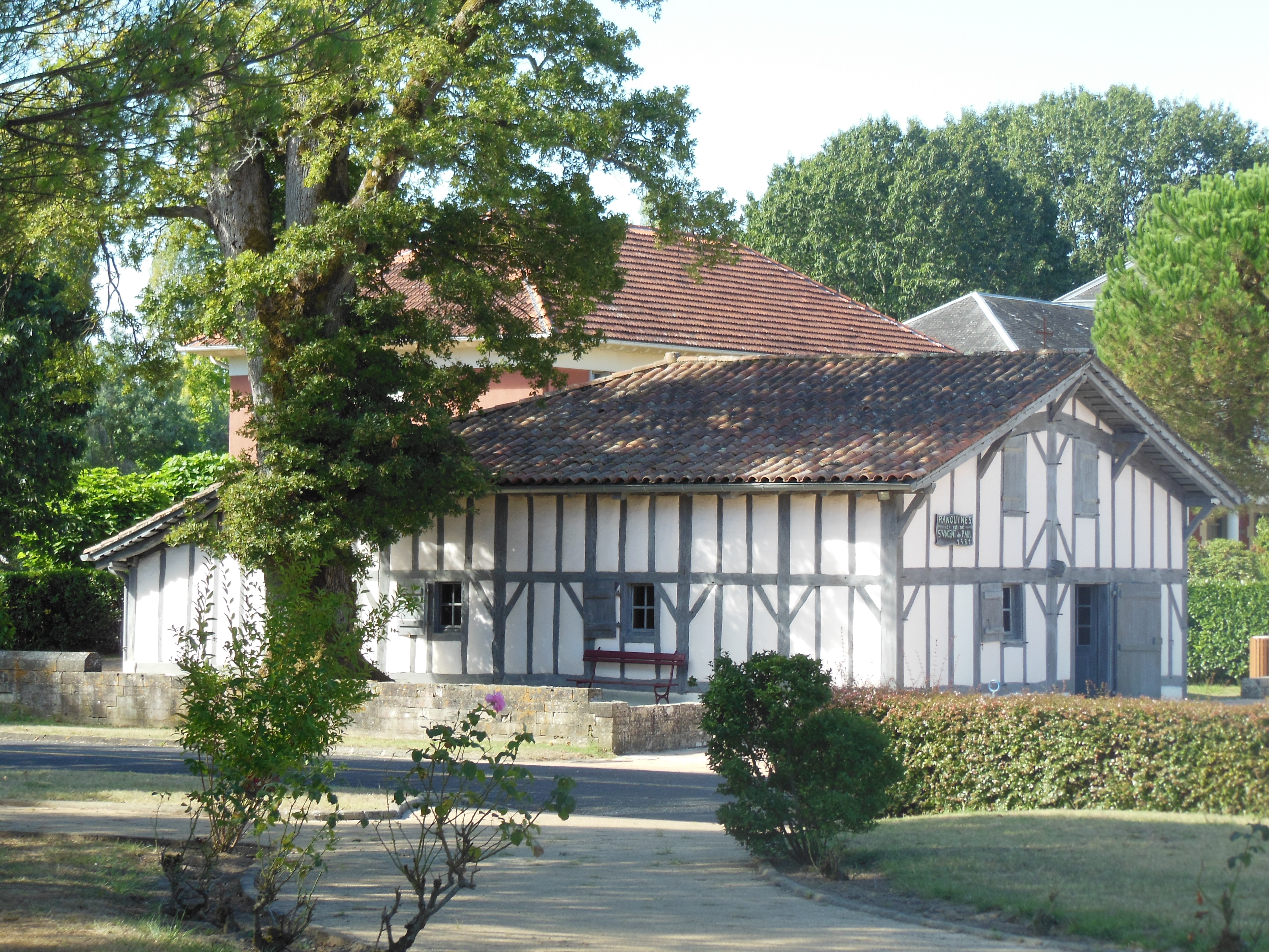 Ranquines, maison natale de Vincent de Paul (commune de Saint-Vincent-de-Paul, Landes, France)